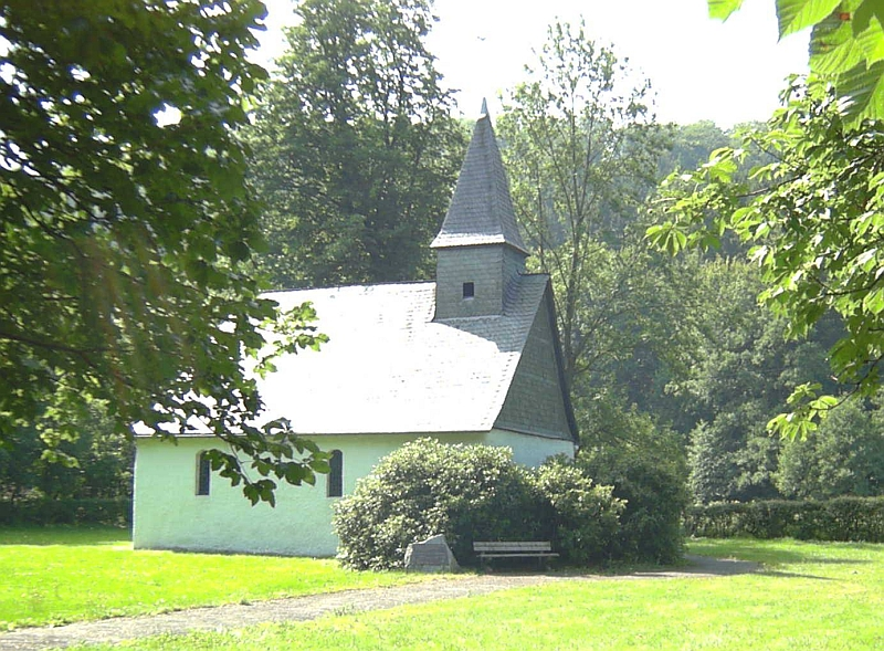 Kapelle St. Katharina, Schmallenberg-Winkhausen , Germany.